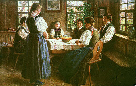 Gutacher Familie von Wilhelm Hasemann